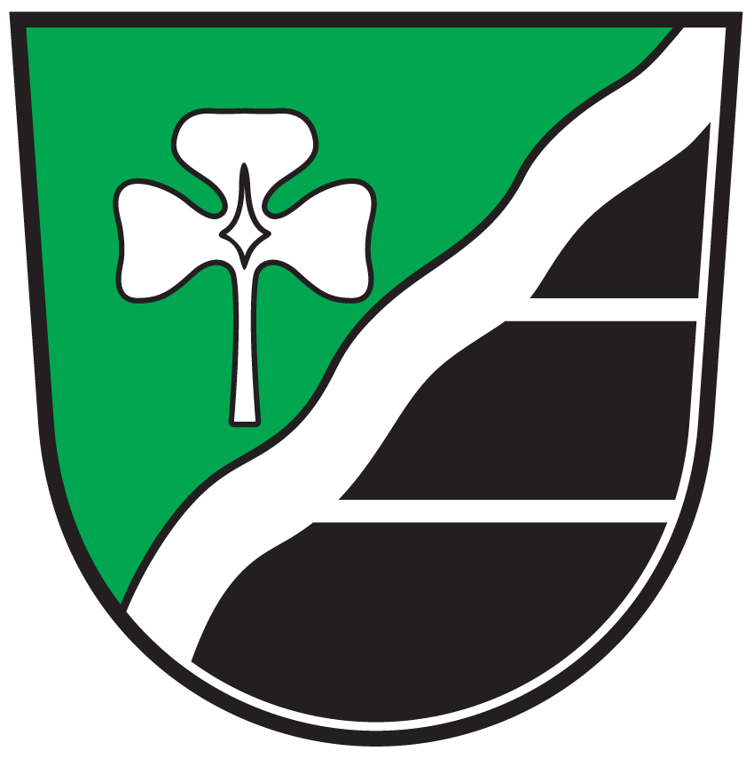 Wappen von Kirchbach